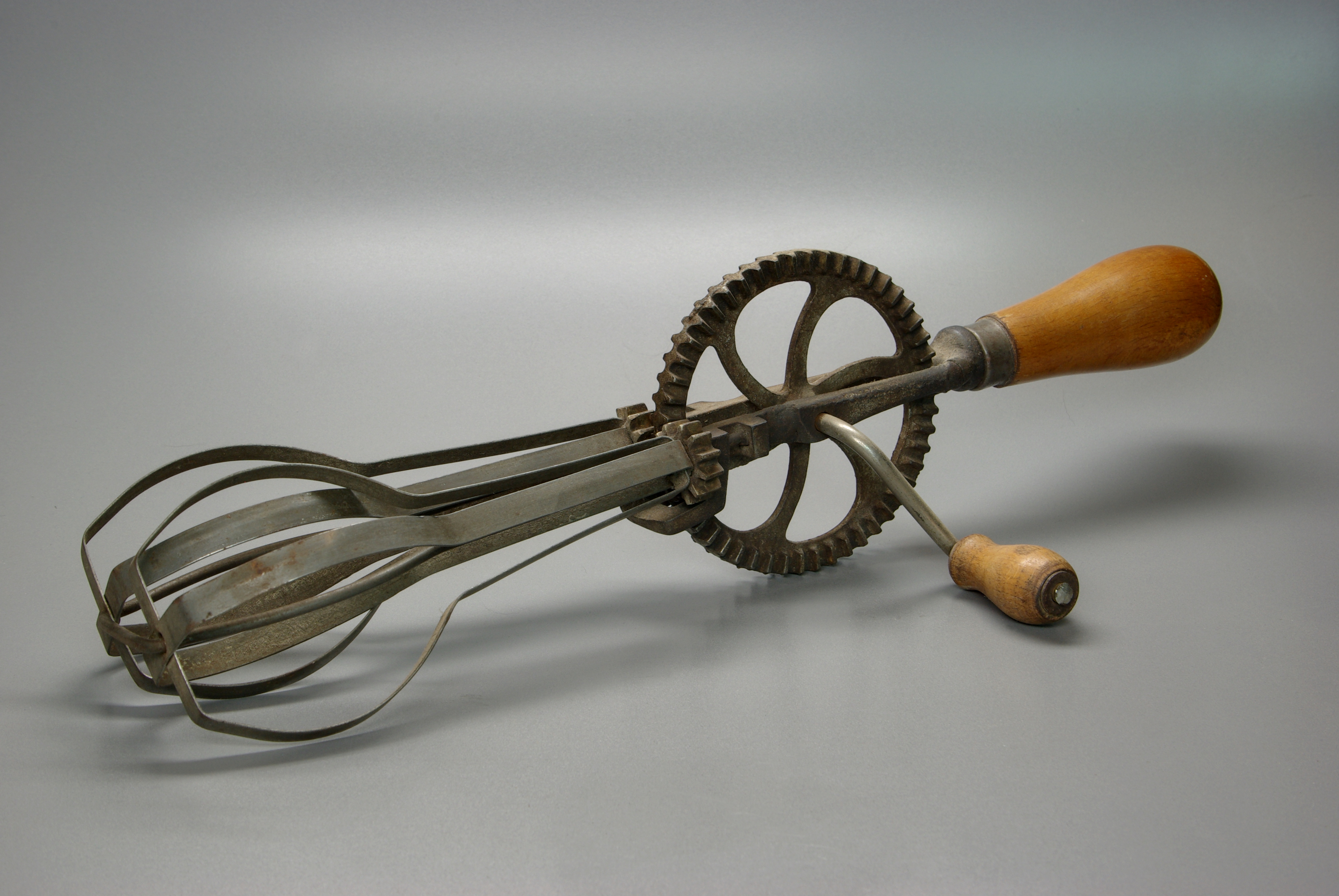 Mixer